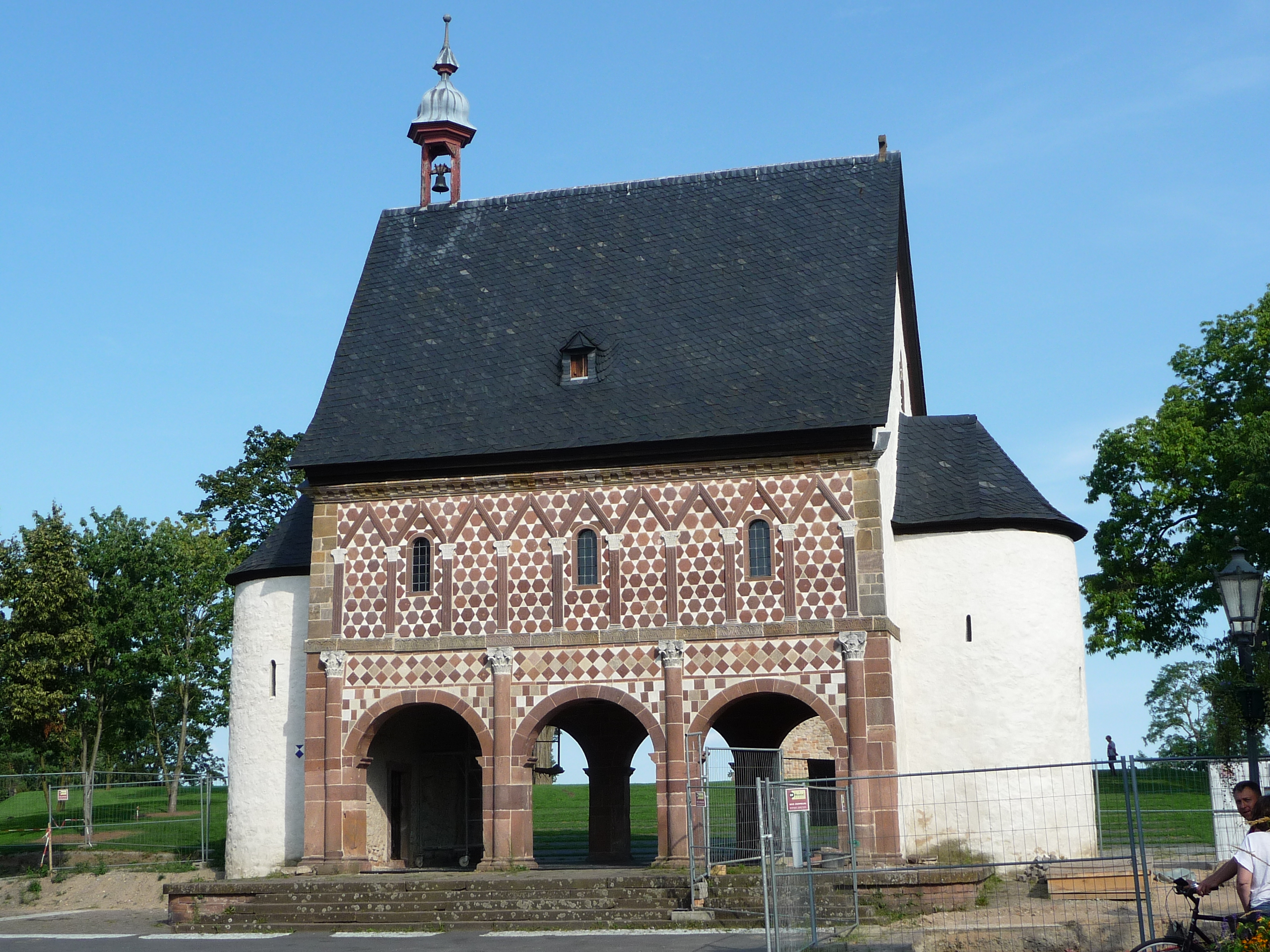 Torhalle am Weltkulturerbe Lorsch, südliches Hessen